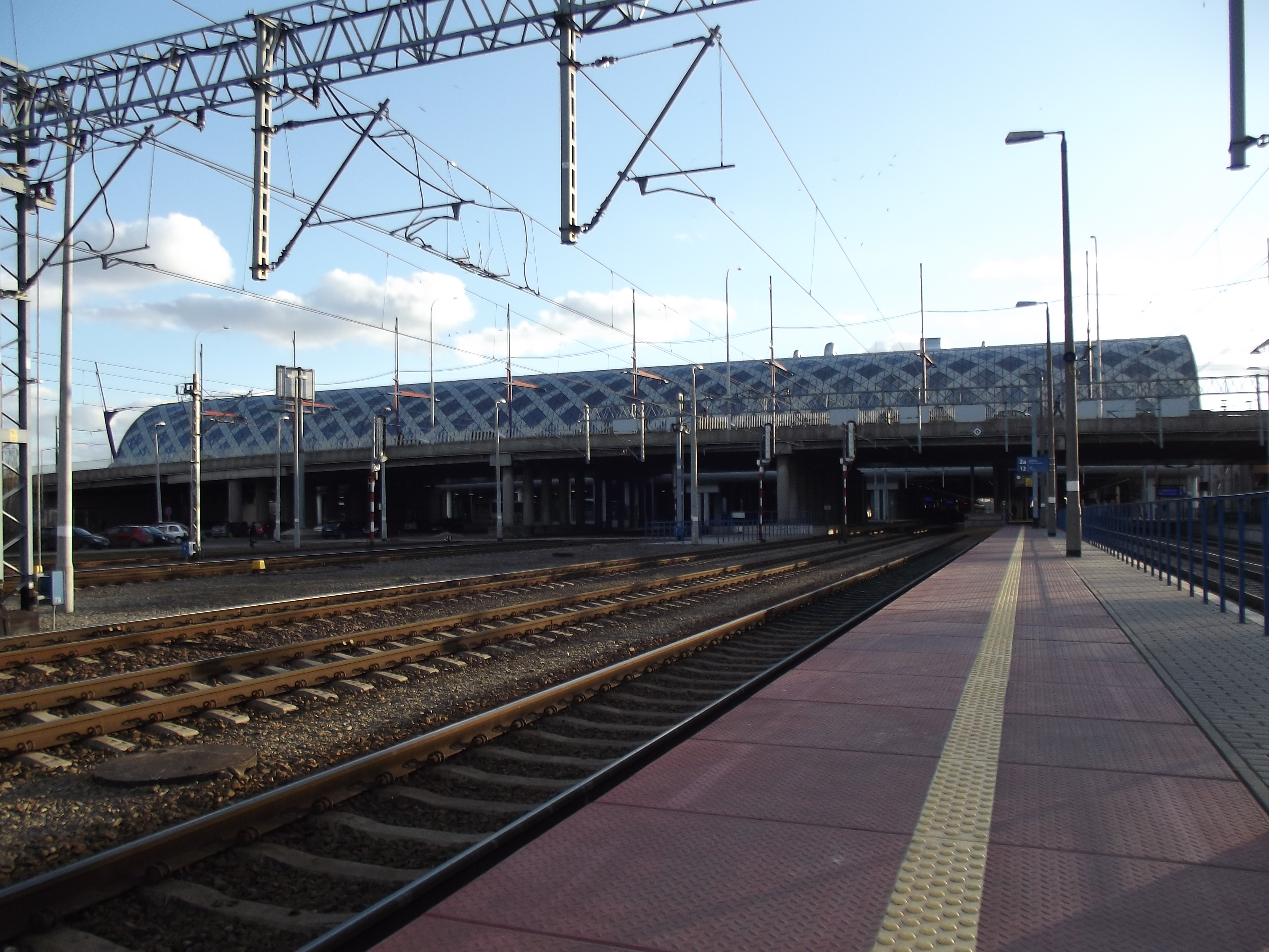 Dworzec Główny w Poznaniu